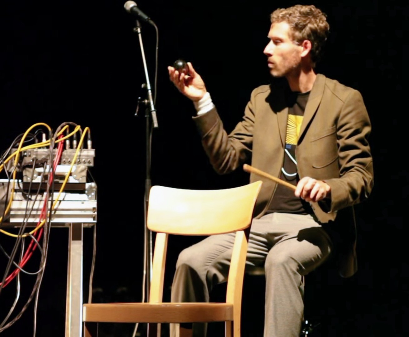 Kampnagel Sommerfestival 2012 Video by: Miki Yui